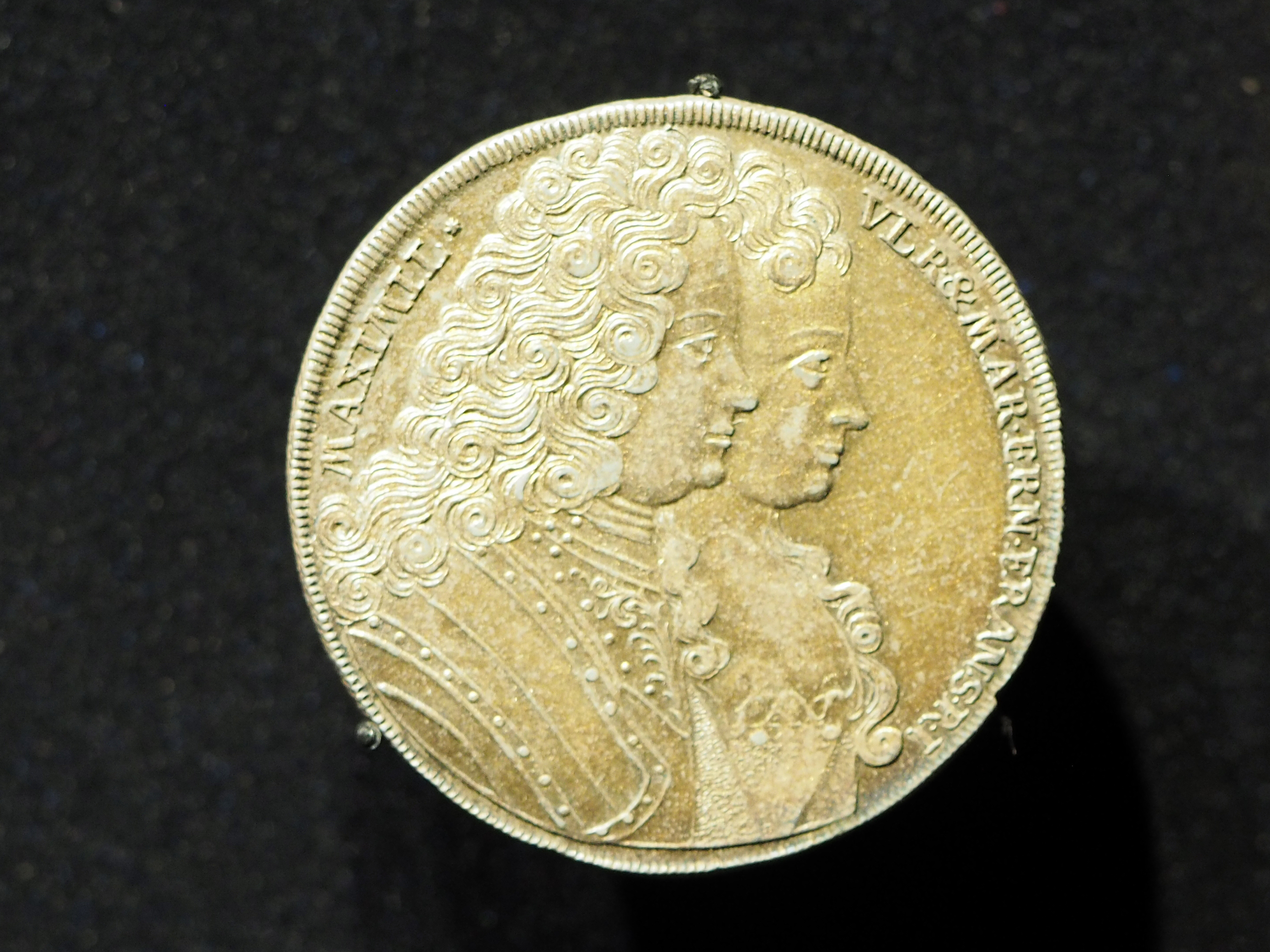 Silber, 29,16 g